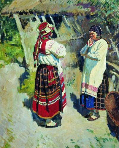 Бабы тульские. 1889 Холст, масло Историко-архитектурный и художественный музей "Новый Иерусалим"